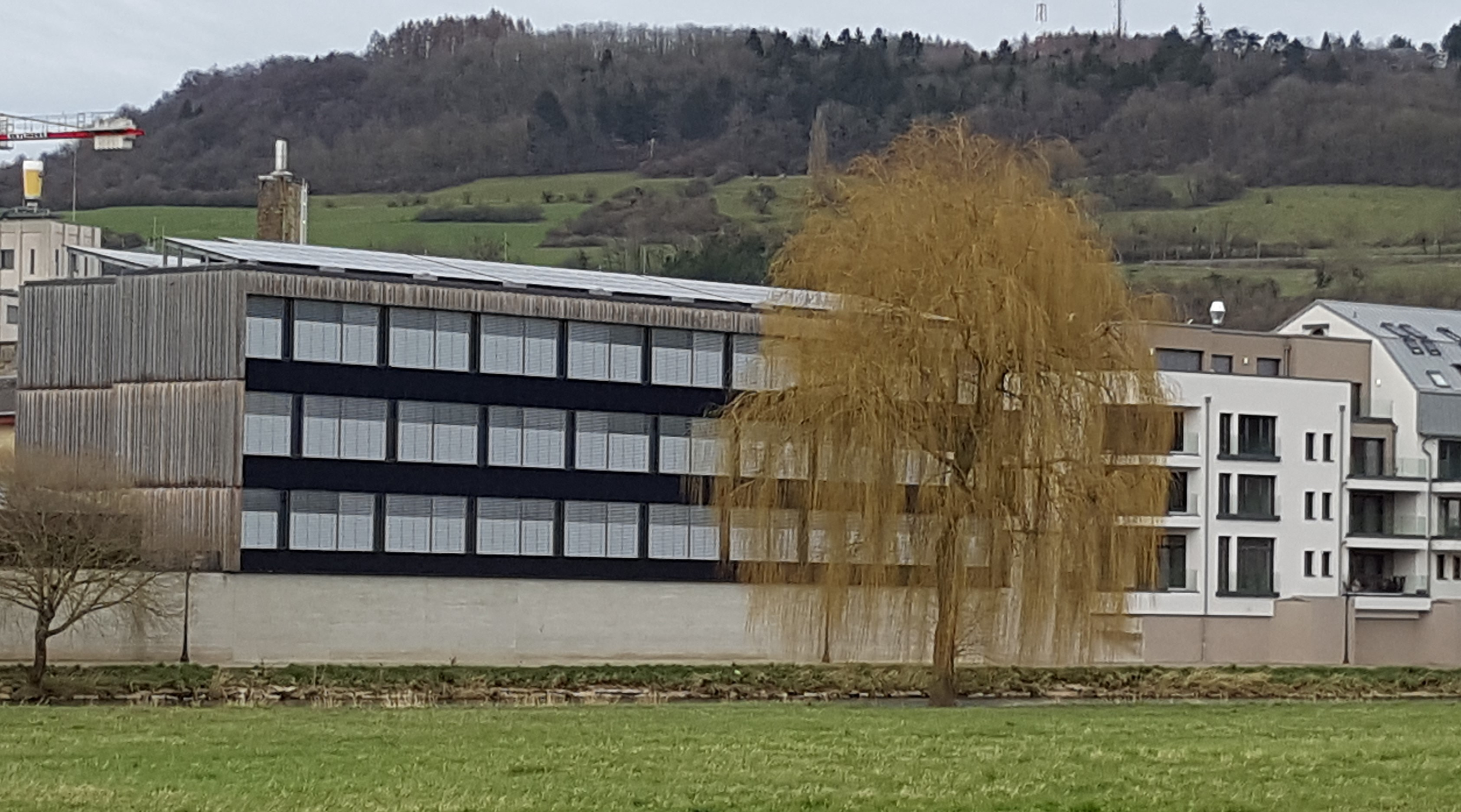 D'Récksäit vun der Natur- a Bëschverwaltung am Abrëll 2018